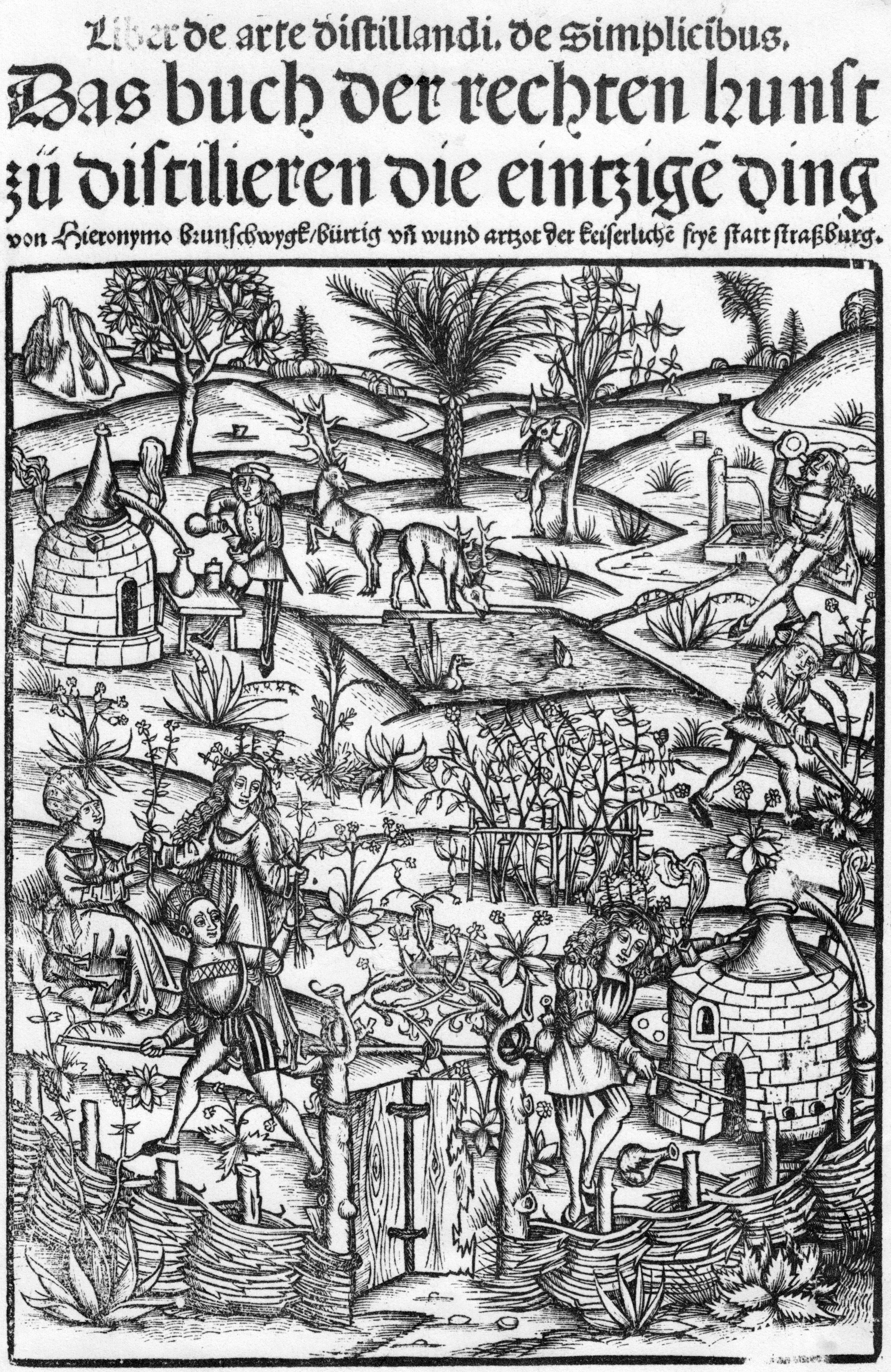 Titelblatt des Kleinen Destillierbuchs von Hieronymus Brunschwig; erstellt von der Holzschneiderwerkstatt Hans Grüningers in Straßburg (1500)